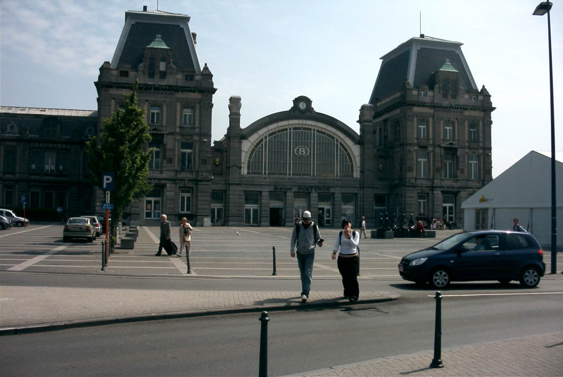 Oostende (Belgium), a pályaudvar épülete